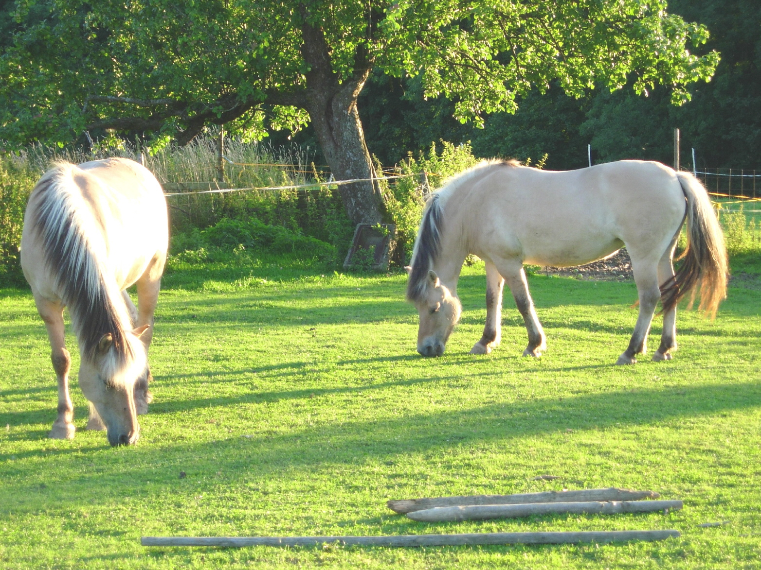 grasende Fjordpferde auf der Schwäbischen Alb.